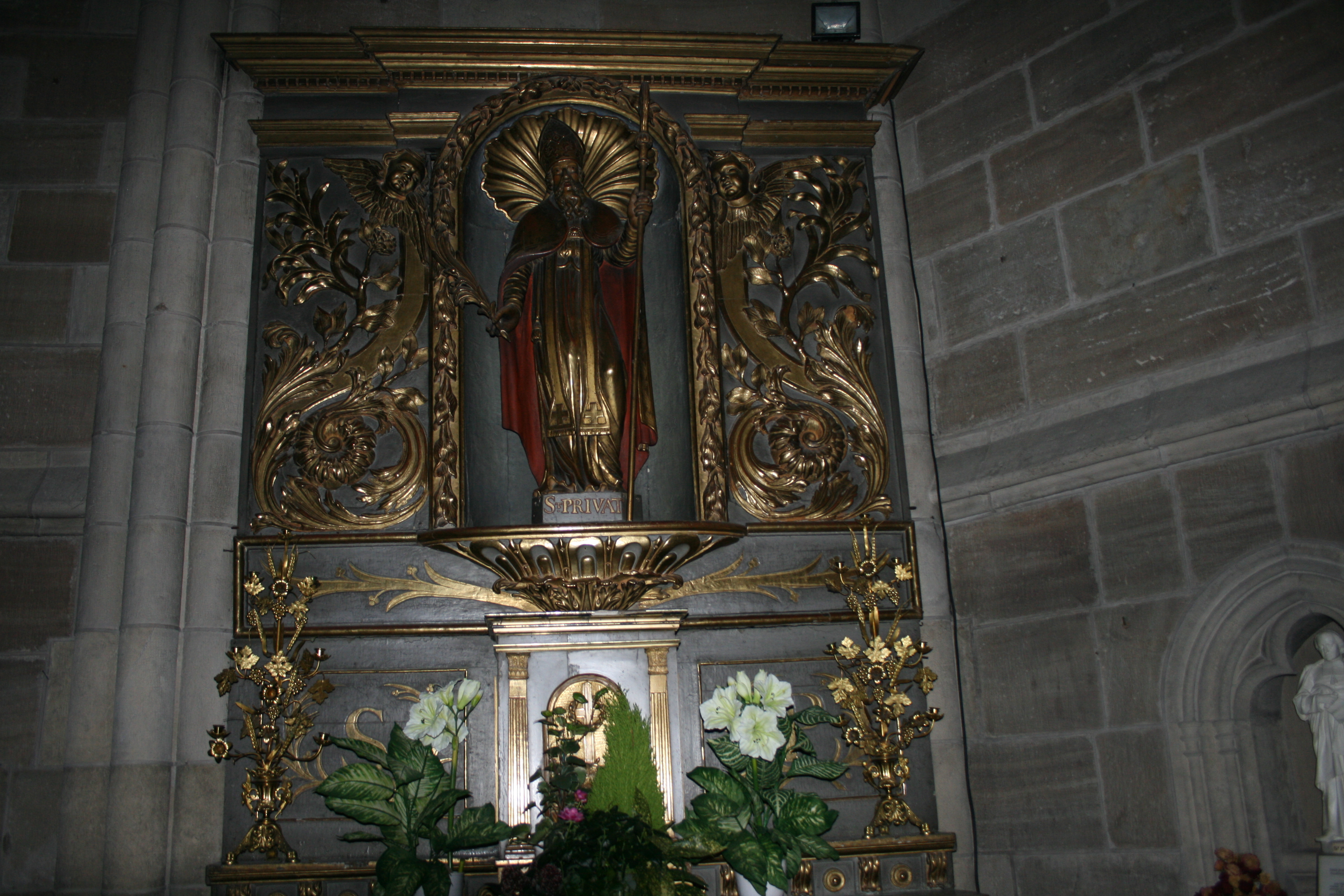 autel de la chapelle Saint-Privat dans la Cathédrale Notre-Dame et Saint-Privat de Mende (Lozère, France)